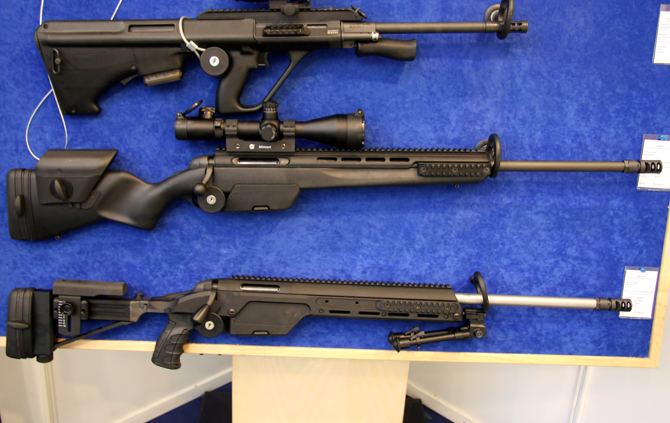 Карабины Mannlicher (Mannlicher carbines)